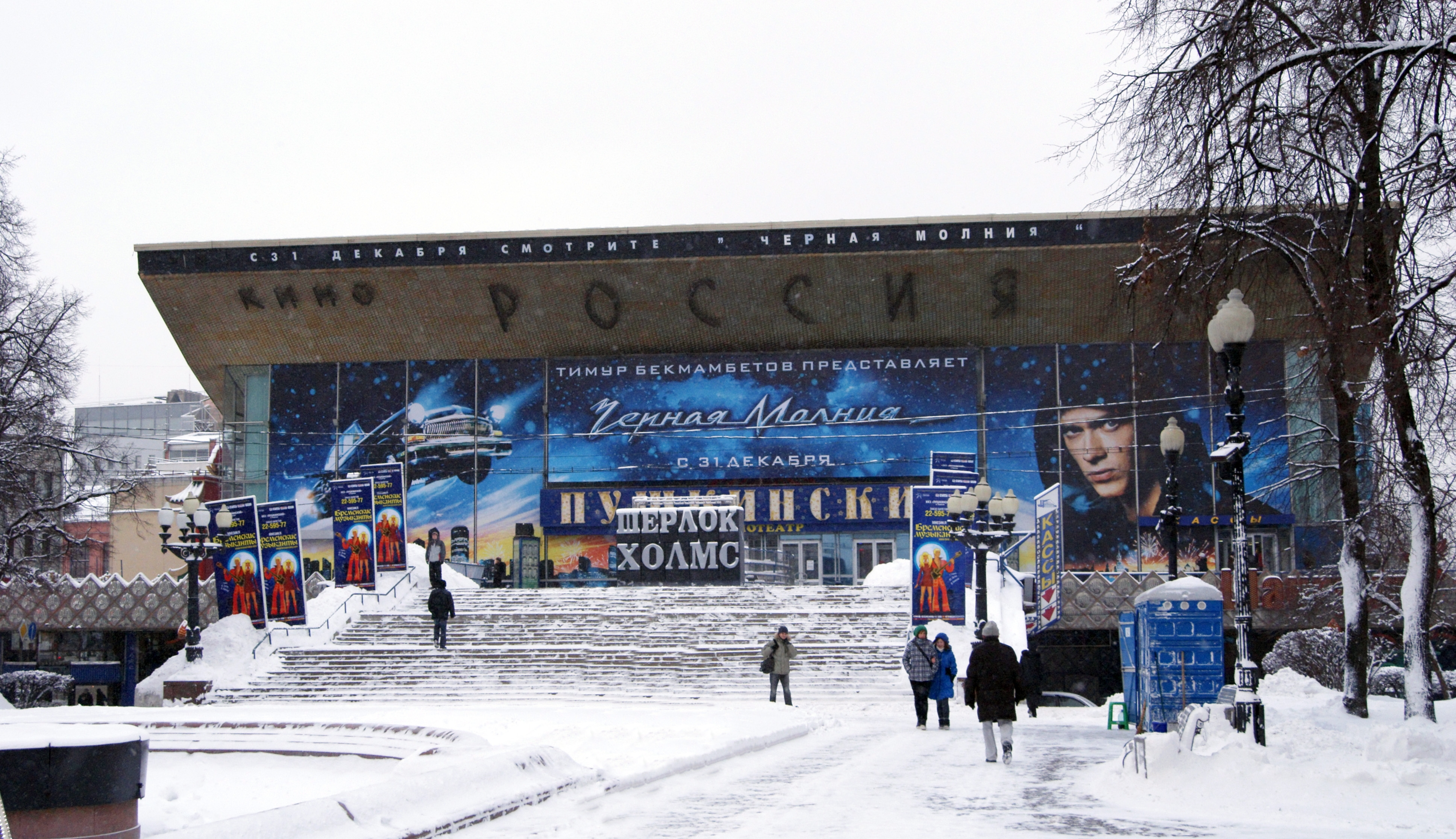 Pushkinsky Cinema